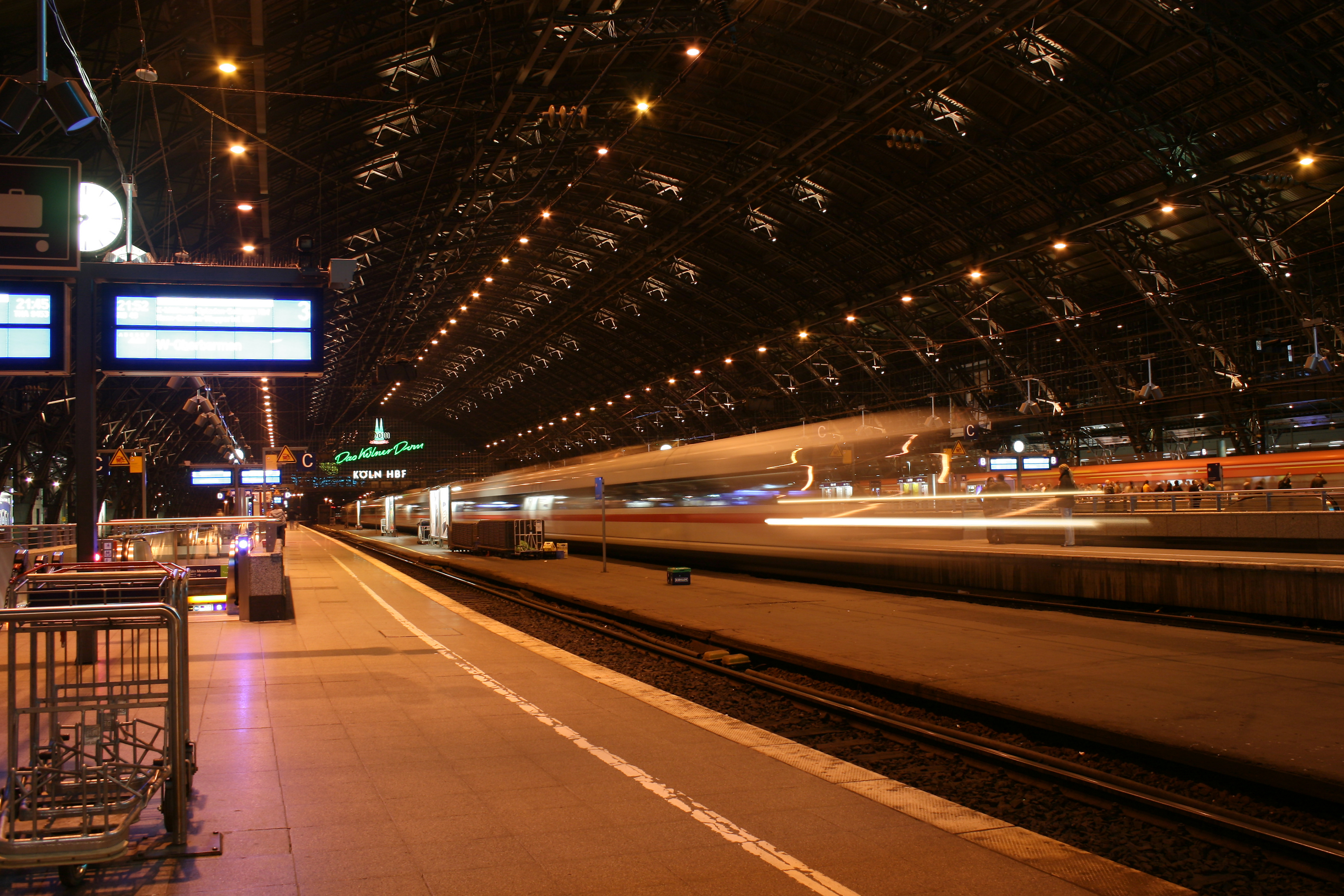 der Innenraum des Kölner Hauptbahnhofes von Gleis 3 aus gesehen